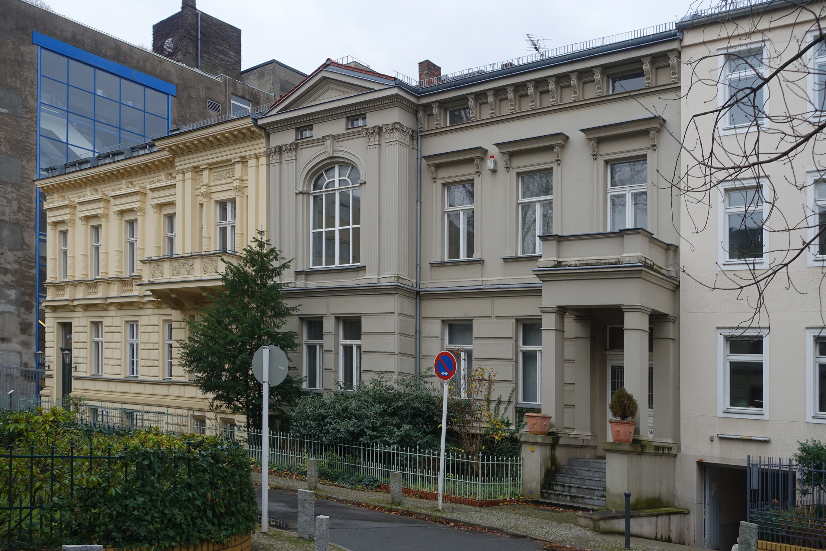 Wohnhausgruppe